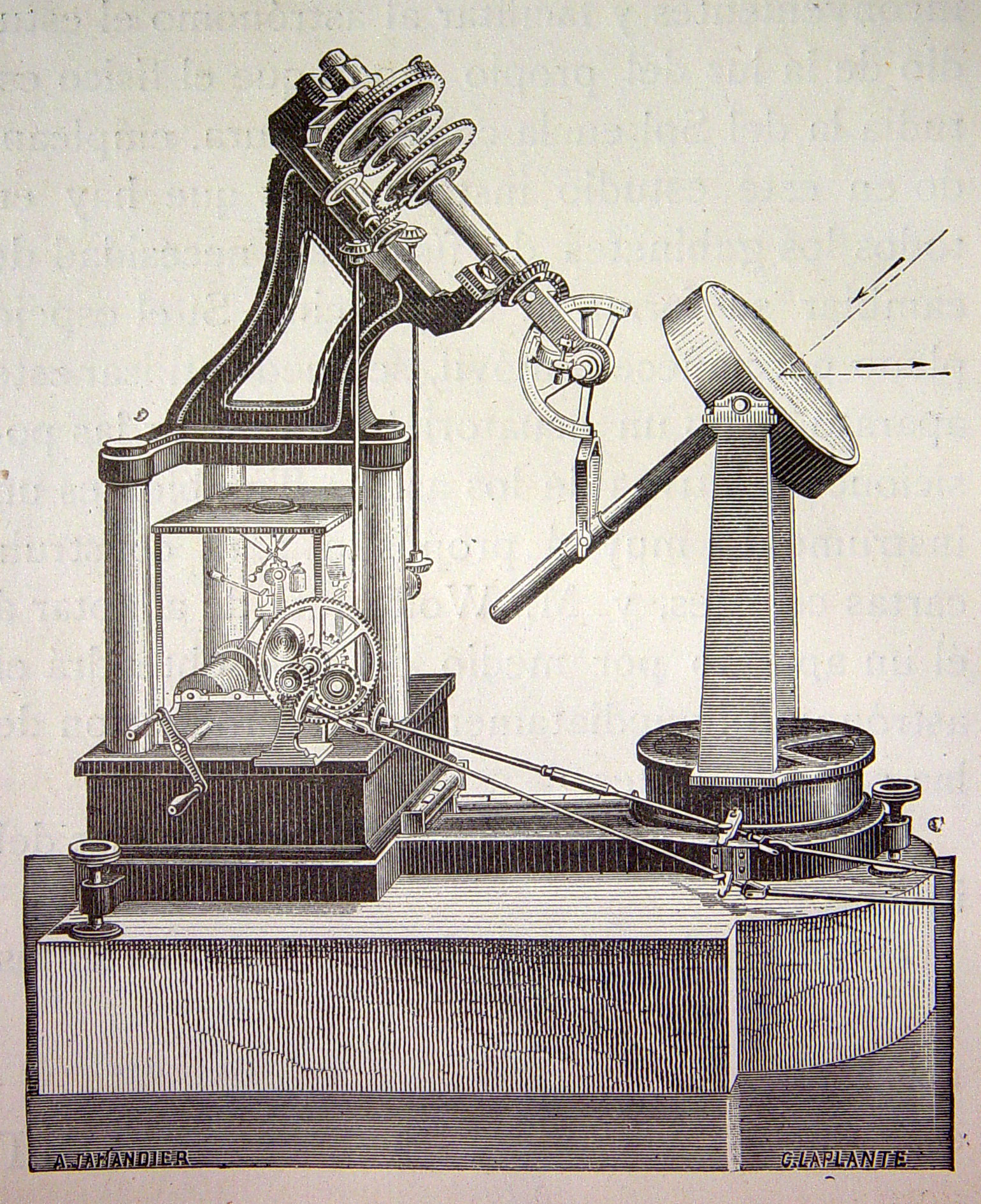 Ilustraciones pertenecientes al libro : El mundo físico : gravedad, gravitación, luz, calor, electricidad, magnetismo, etc. / A. Guillemin. - Barcelona Montaner y Simón, 1882